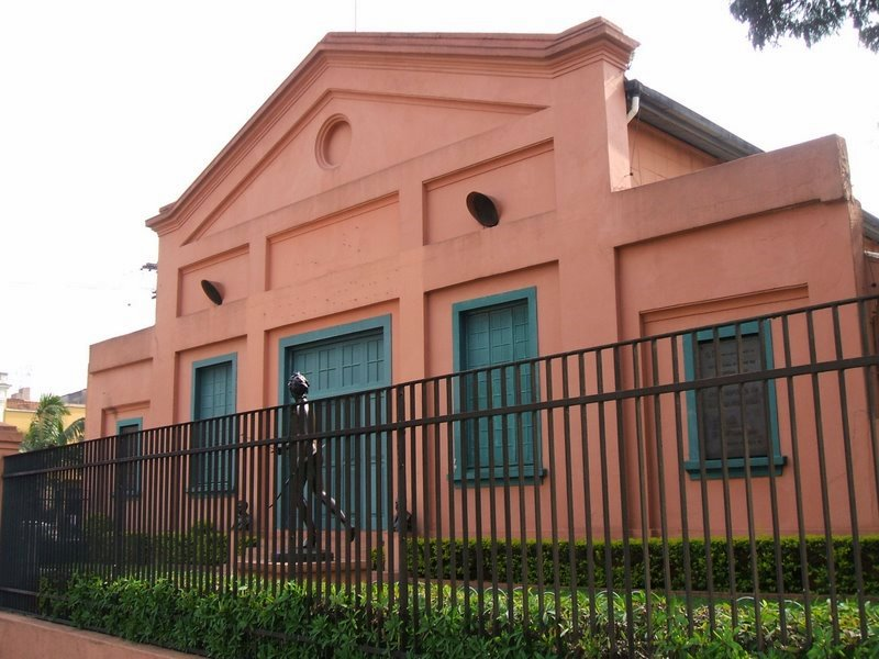 Centro Cultural do Liceu de Artes e Ofícios de São Paulo, no bairro paulistano do Pari.